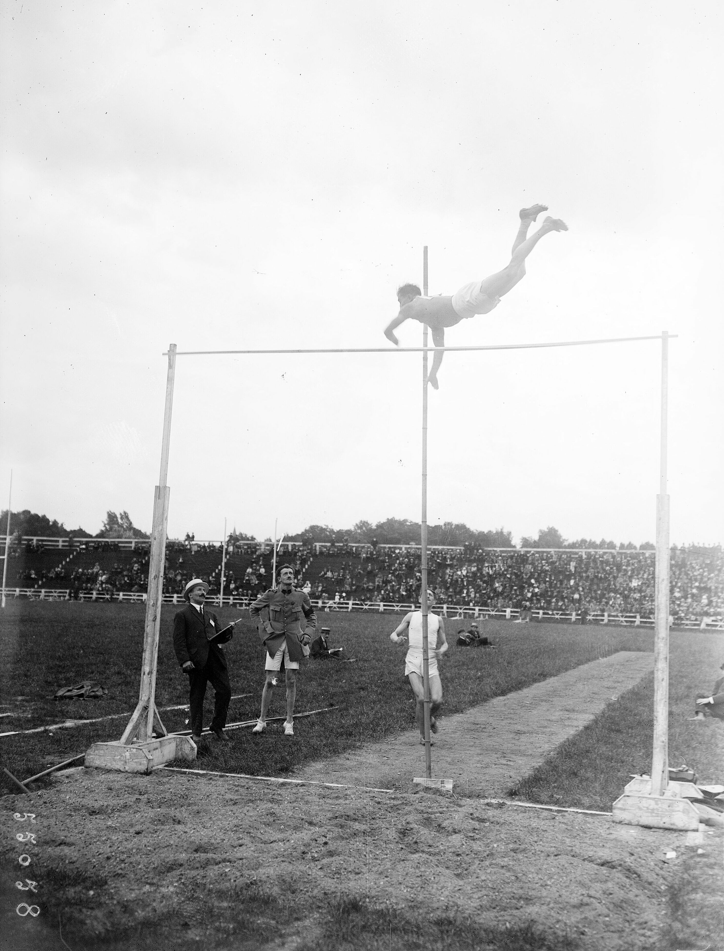 André Francquenelle en train de sauter à la perche lors des championnat de France d'athlétisme le 20 juillet 1919.